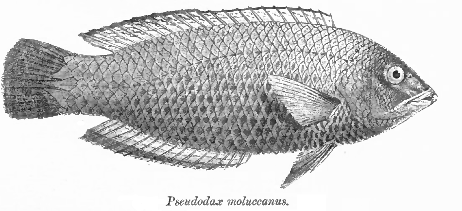 Pseudodax moluccanus (Valenciennes, 1840)